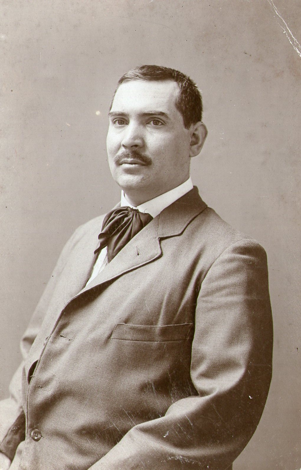 Fotografía de José Navarro Cabanes